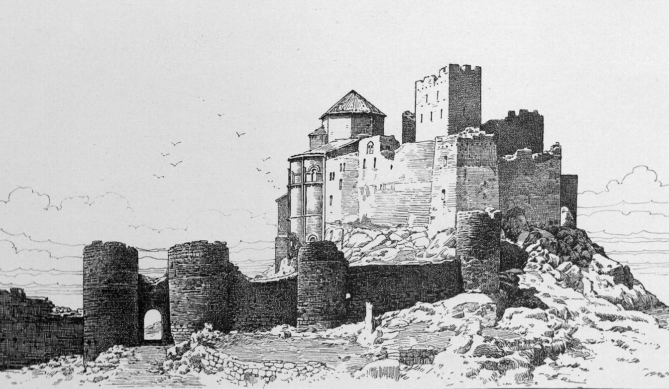 Núm. 2. Castillo de Loarre. Vista general de las murallas y de la fortaleza.